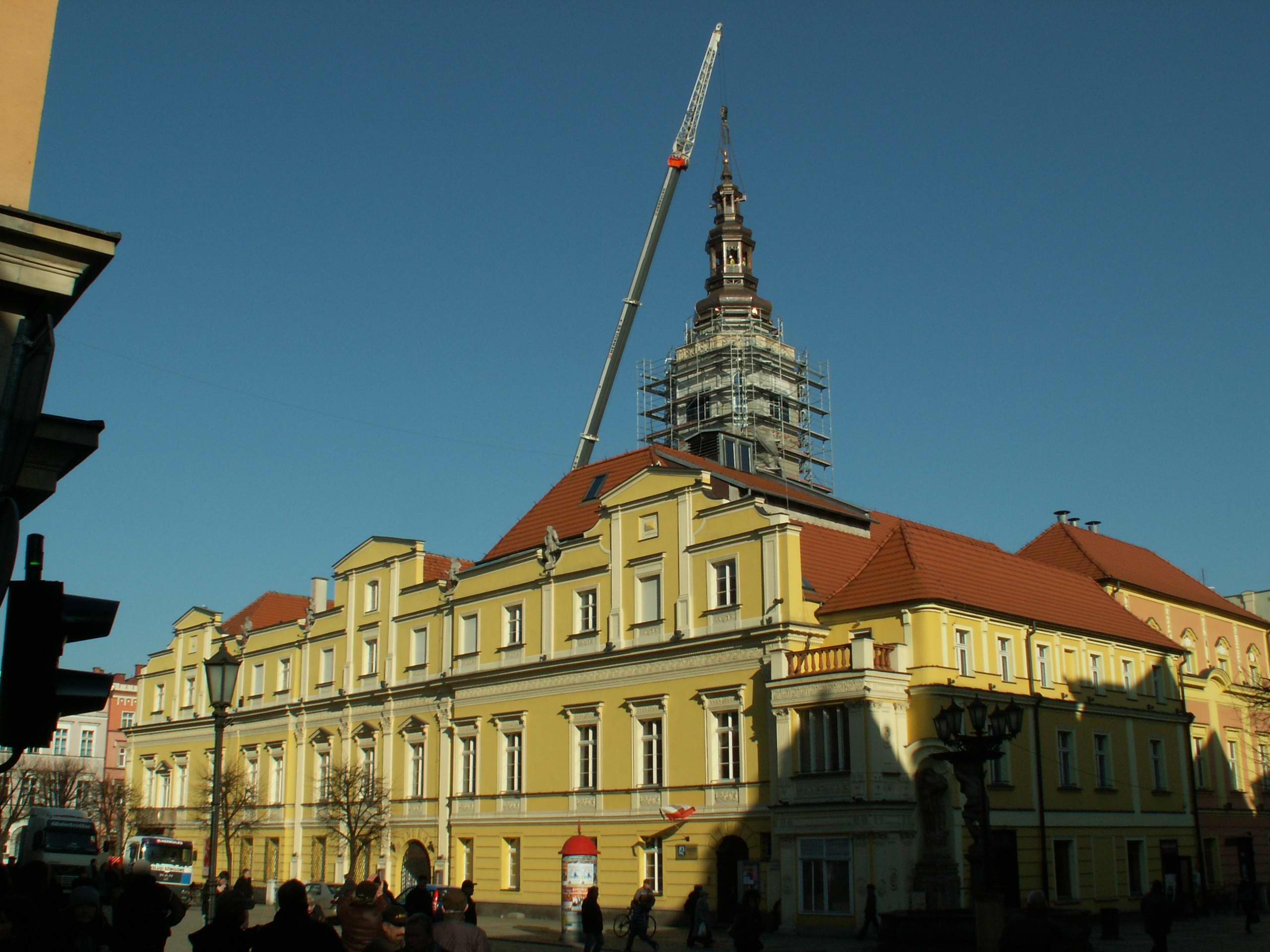 Ratusz w Świdnicy 5.03.2012 godzina 15:30 - powrót wieży po 45 latach.